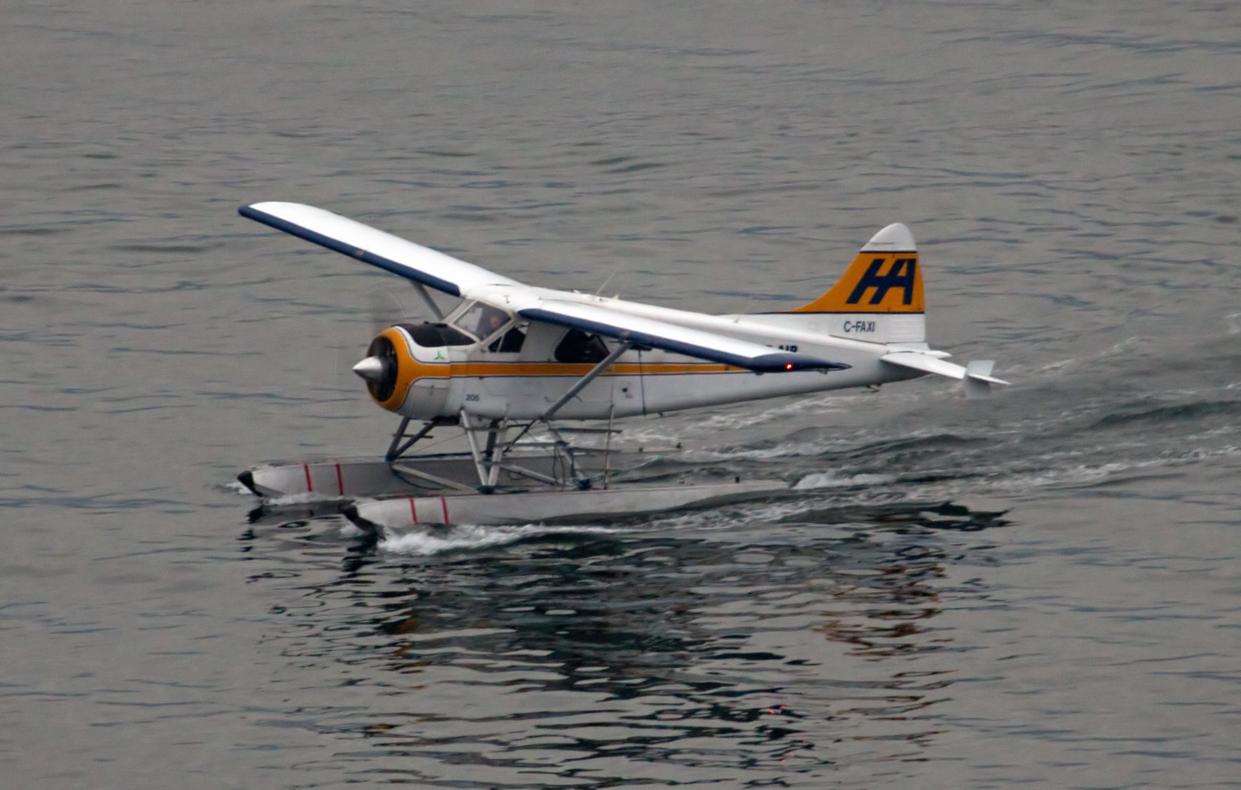 Harbour Air De Havilland Canada DHC-2 Beaver Mk1 C-FAXI 2